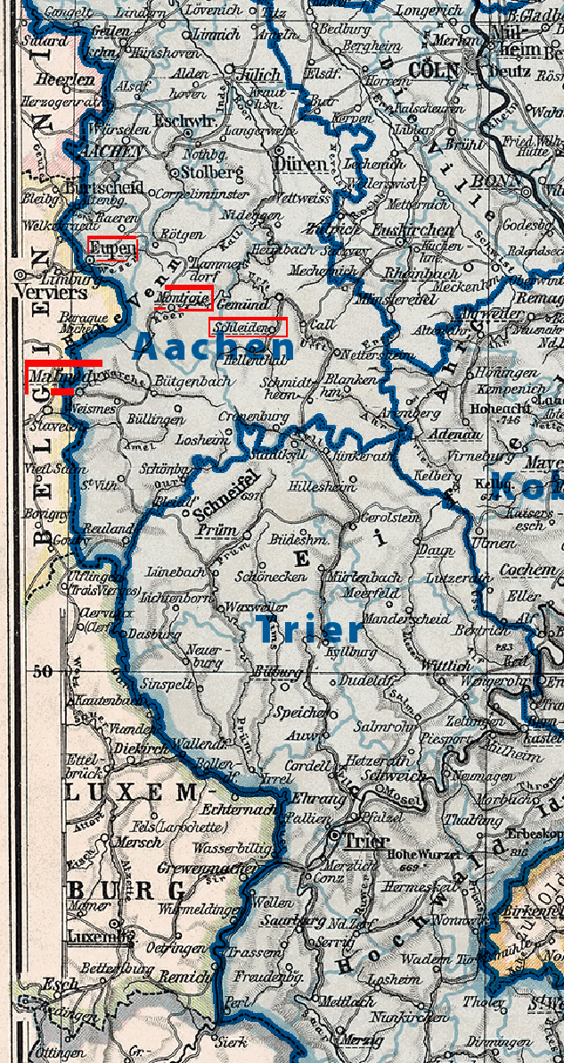 Es wird vor allem der südliche Bereich des Regierungsbezirks Aachens sowie des nördlichen Bereichs des Regierungsbezirks Trier gezeigt. Außerdem sind erhebliche Teile des Herzogtums Luxemburg sowie die Städte Köln und Limbourg zu sehen. Die namensgebenden Hauptorte der Landkreise südlich von Aachen - nämlich Eupen, Malmedy, Montjoie und Schleiden - sind rot markiert. Die Gebiete kamen erst 1815 beim Wiener Kongress Preußen und damit 1871 zum Deutschen Kaiserreich. Eupen und Malmedy wurden ab 1919 wieder aus Preußen und dem Deutschen Reich ausgegliedert.